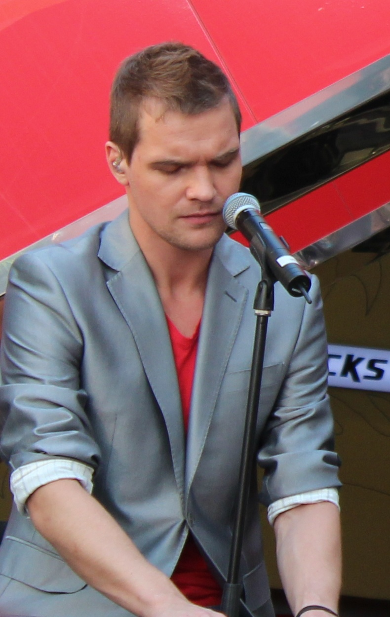 Ott Lepland oma viimasel kontserdil enne ärasõitu Eurovisioni lauluvõistlusele 13. mail 2012 Kristiine keskuse aatriumis